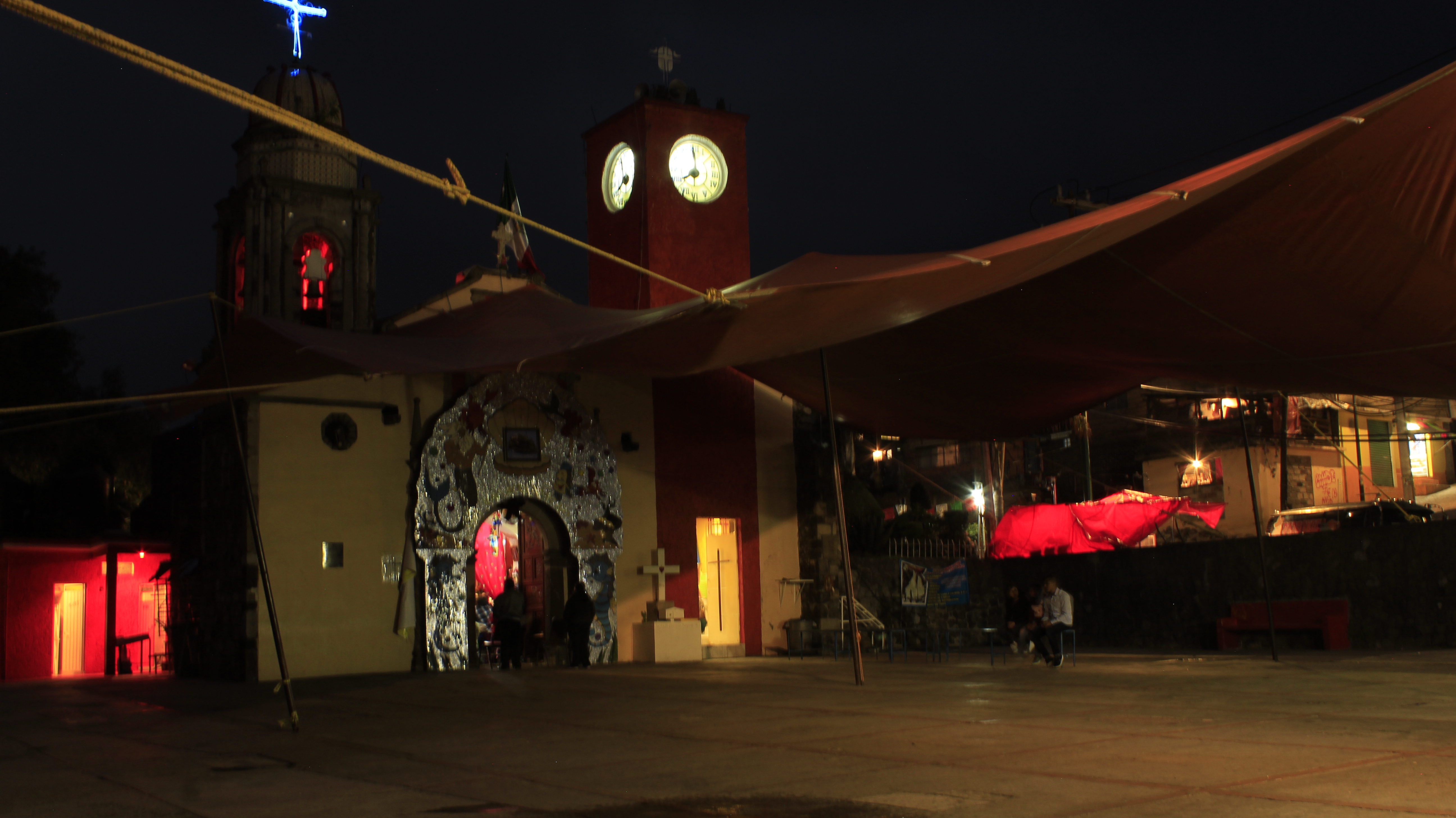 La capilla se encuentra adornada por la festividad a "La Santa Infantita", que se celebra a mediados de Septiembre.